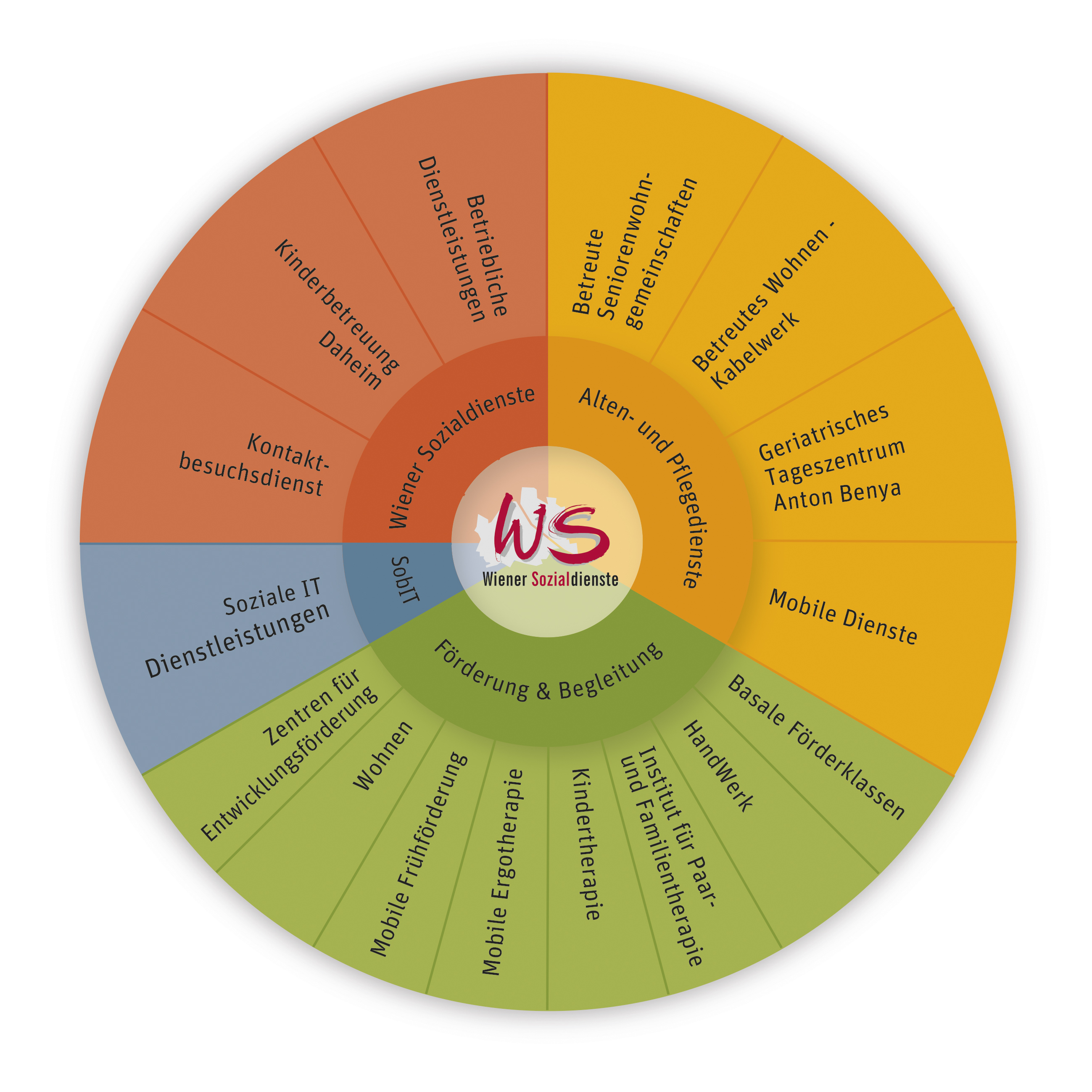 Struktur Wiener Sozialdienste